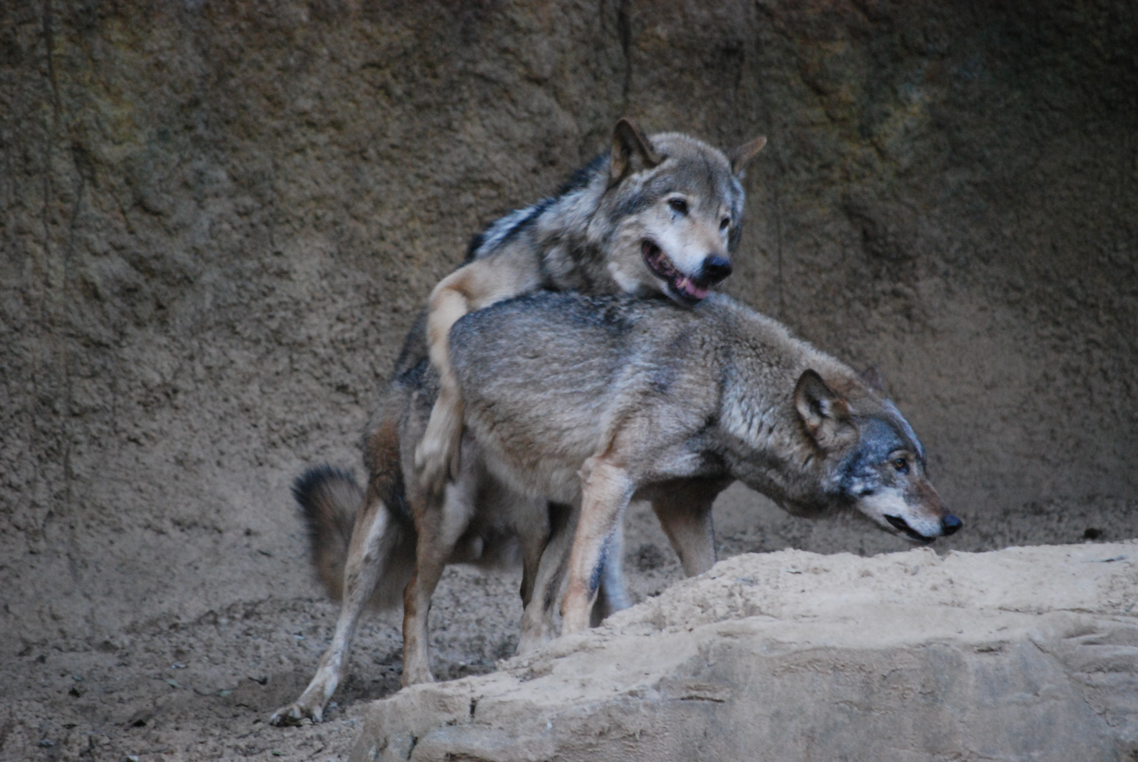 メスはとっくに飽きたツラしてるというのに、オスのこのスマイルみてください！！！！！！ オロカなり！男！！！！